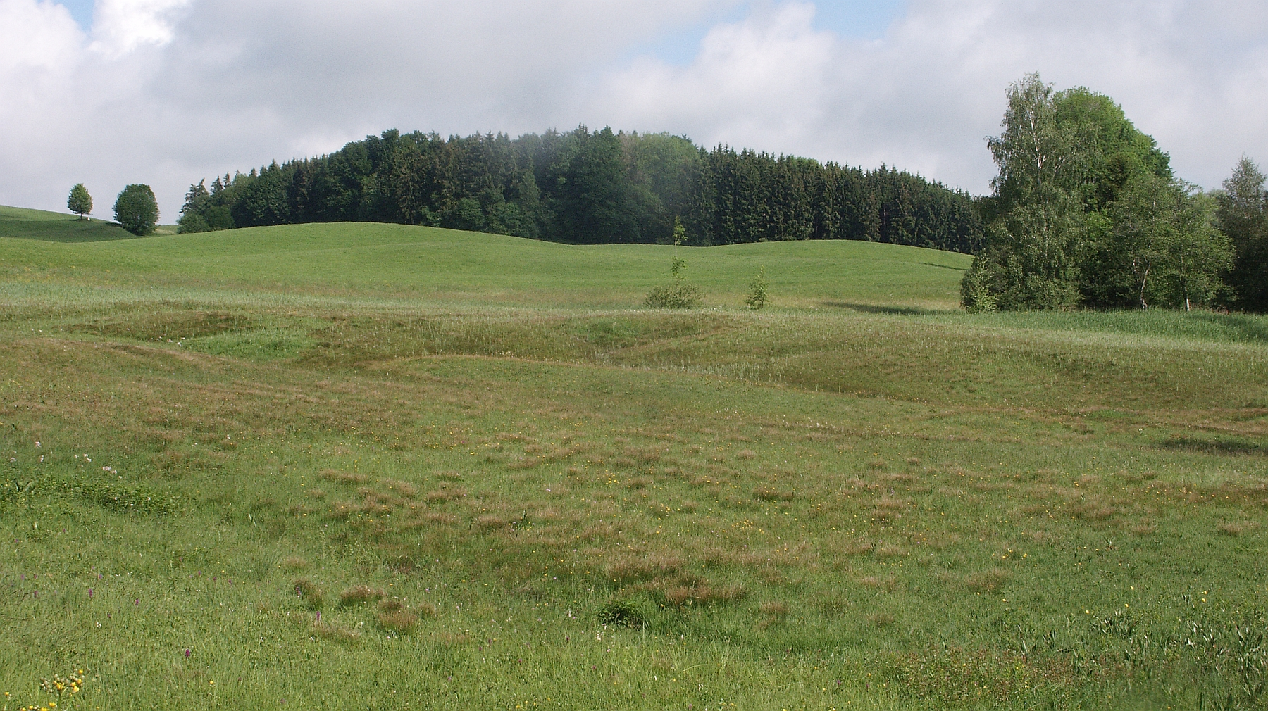 Pflanzengesellschaft Primulo-Schoenetum ferrugineiHangquellmoor in Oberschwaben, Deutschland